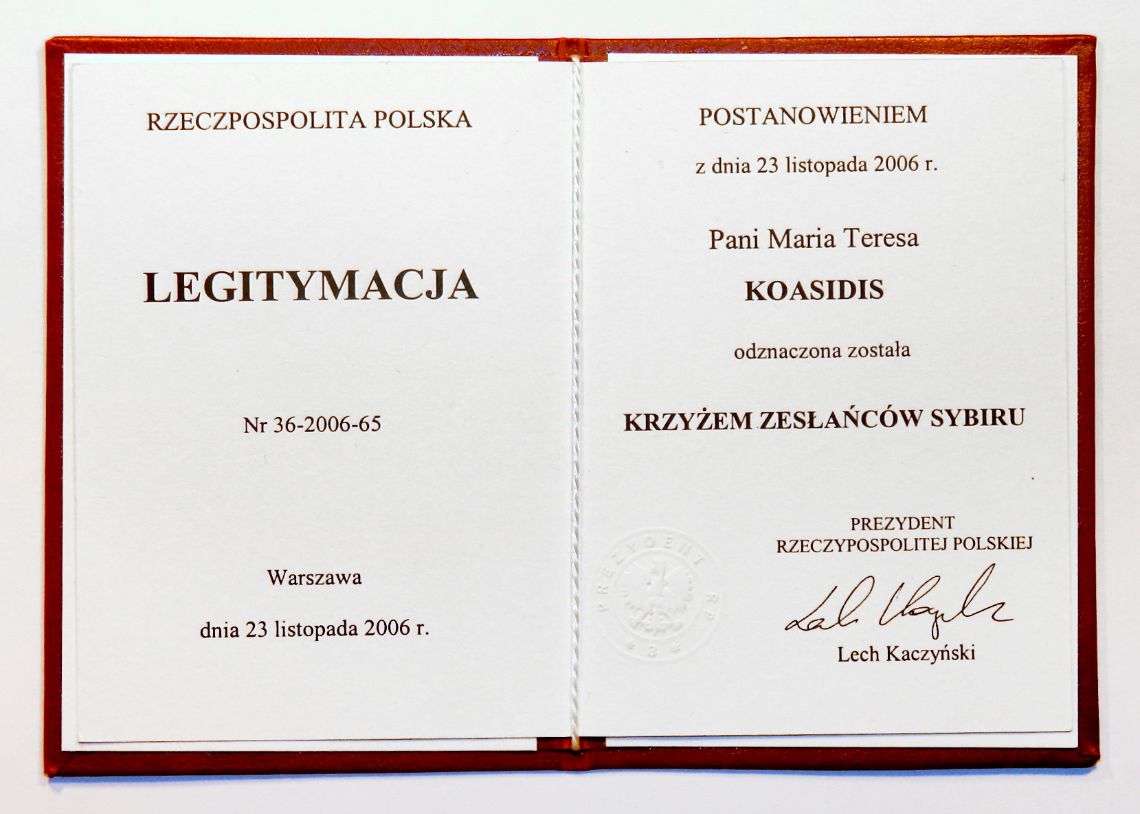 Legitymacja potwierdzająca nadanie Krzyża Zesłańców Sybiru. Odznaczoną Marię Koasidis, 10 lutego 1940r. deportowano z powiatu tarnopolskiego, w jej wczesnym wieku dziecięcym. W 1946r. zbiegła, bez dokumentów docierając do Polski, dzięki wielokrotniej pomocy przypadkowych, ryzykujących własne życia Polaków i Rosjan. Publikacja legitymacji za zgodą spadkobierców Zmarłej.